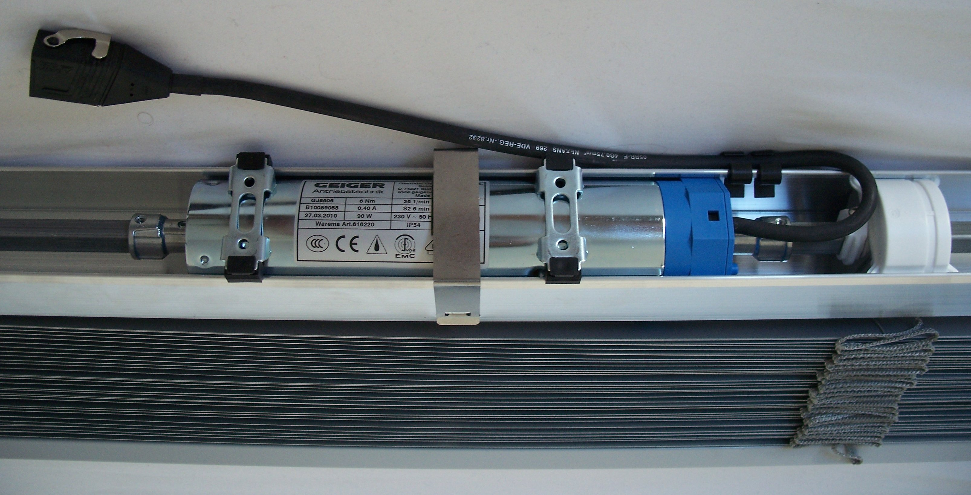 Raffstore-Antriebsmotor in der Oberschiene mit integriertem Planetengetriebe, einstellbaren Endschaltern und einem mechanischen Endtaster.